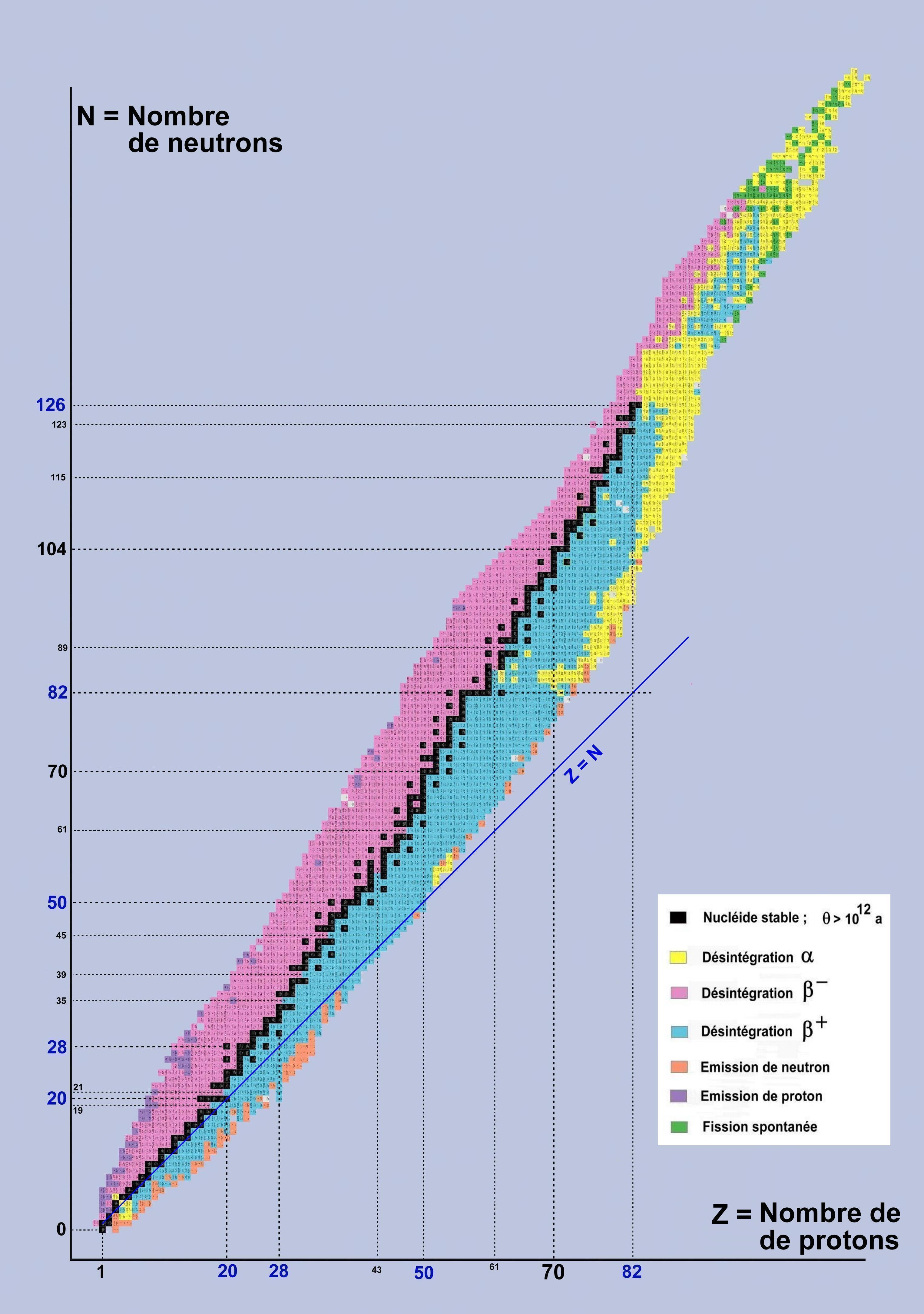 Graphique montrant la vallée de la stabilité des noyaux et le type de radioactivité associé